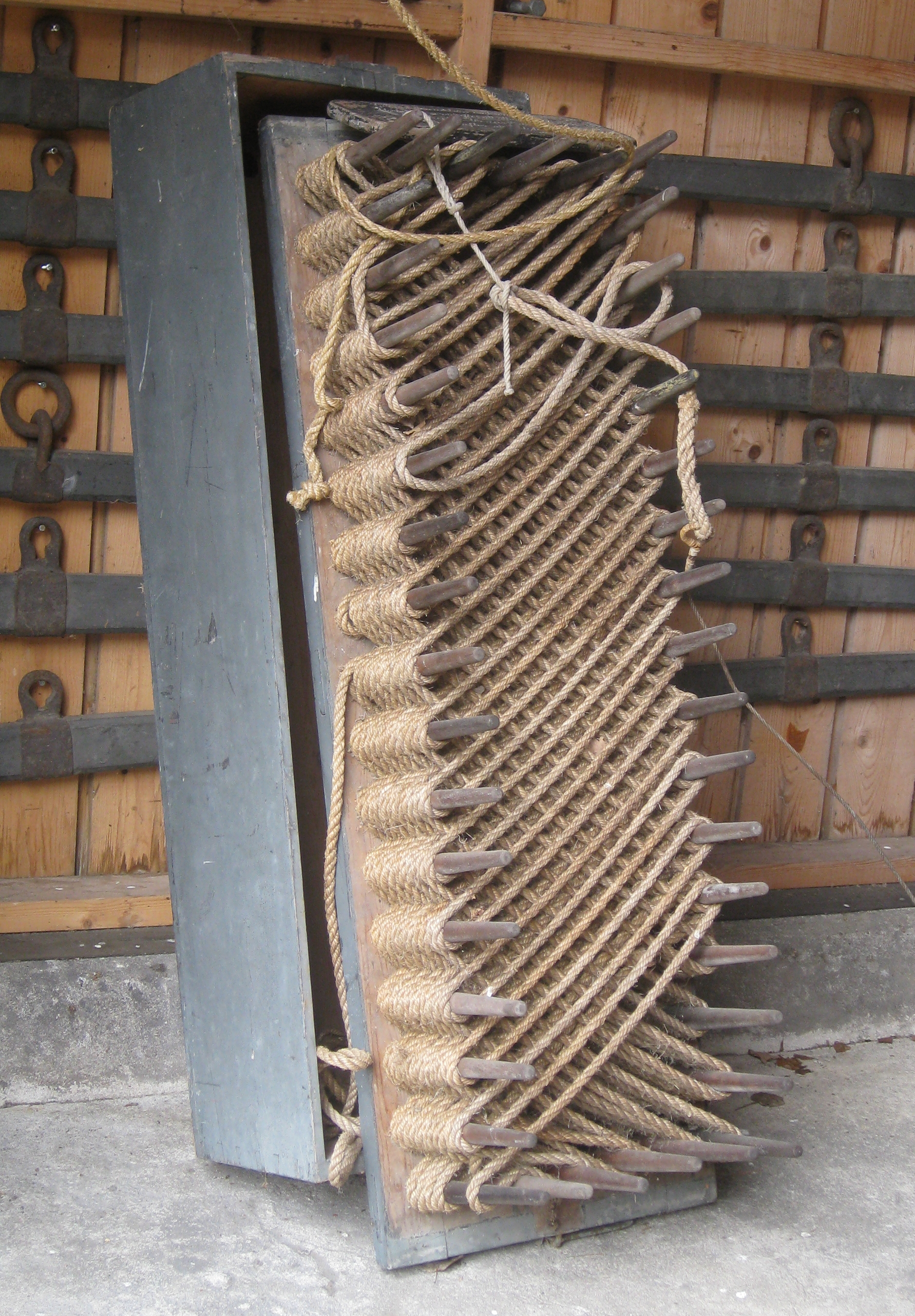 Raketapparat i Sandhammarens livräddningsmuseum